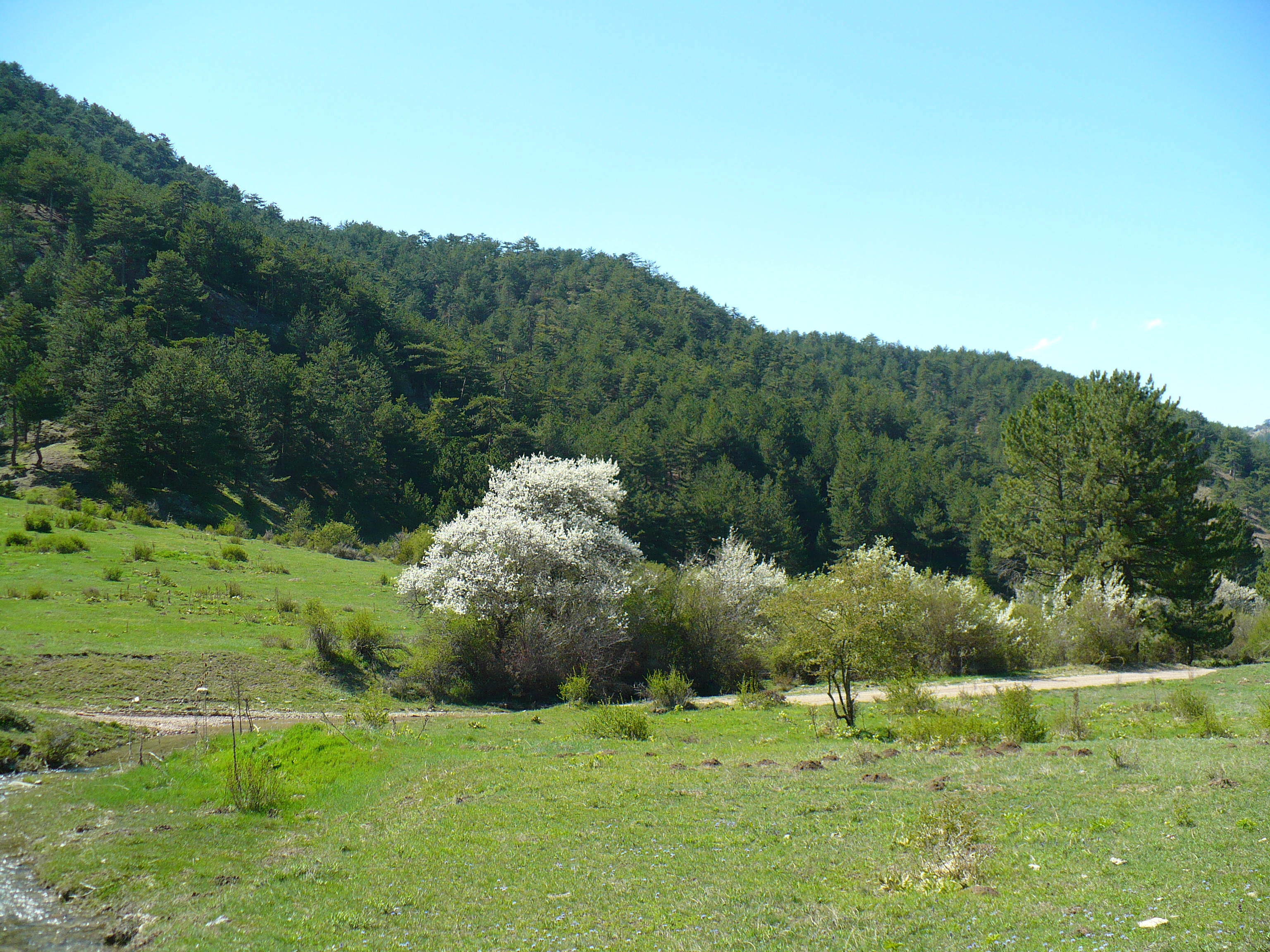 Abant'tan bir görüntü